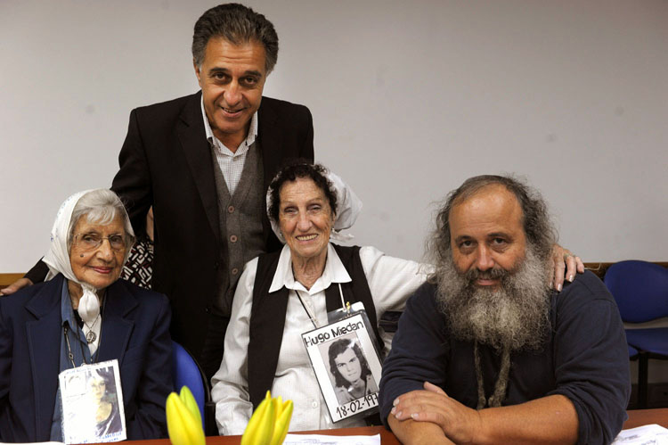 Néstor Pitrola junto a los activistas de derechos humanos Mirta Baravalle y Elia Espen (Madres de Plaza de Mayo Línea Fundadora) y Enrique Fukman (Asociación de ex Detenidos Desaparecidos)